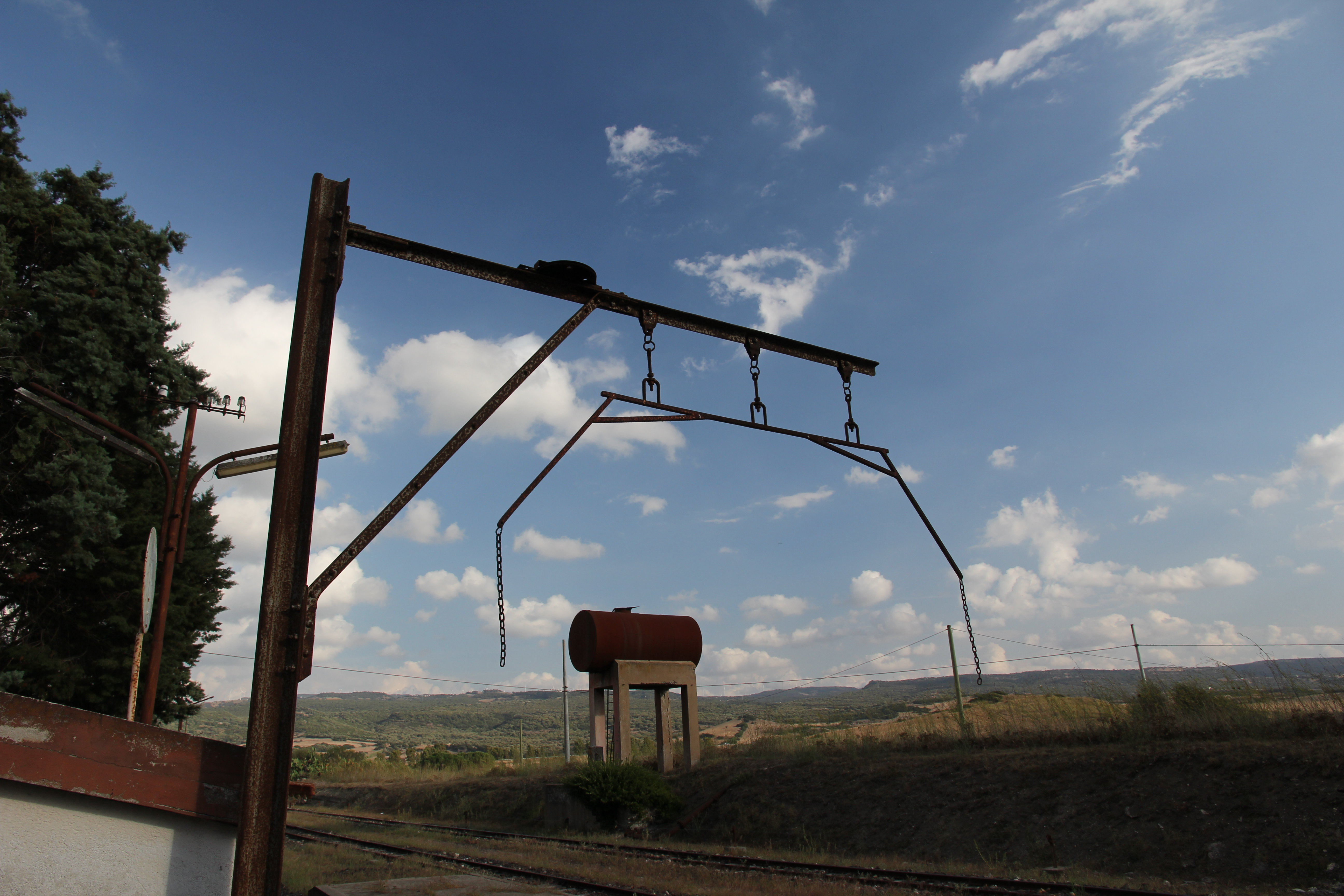 Perfugas - Stazione ferroviaria